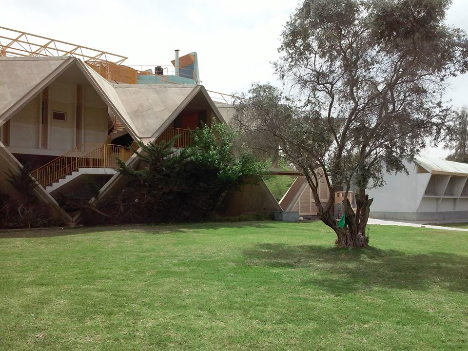 Archiwum Ben Guriona w Sde Boker